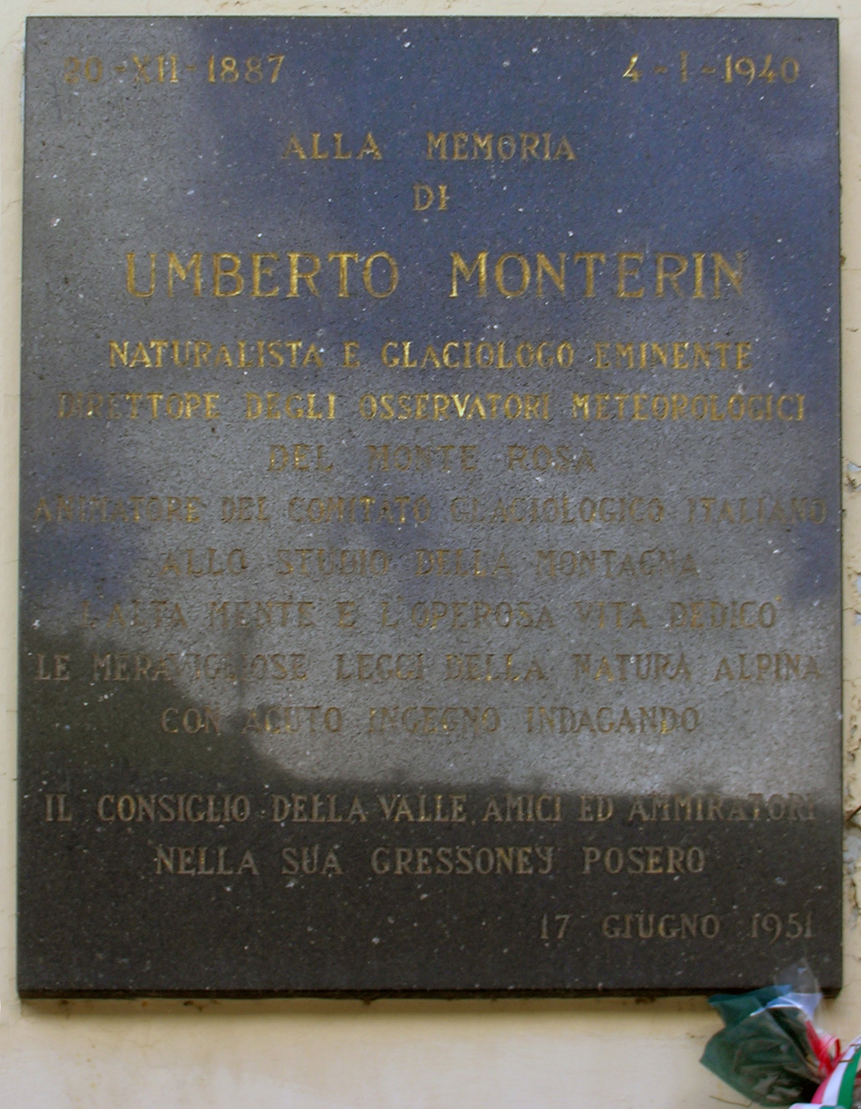 Lapide commemorativa sulla chiesa Oberteilplats dedicata al glaciologo e naturalista Umberto Monterin (1887 - 1940), Gressoney-La-Trinité, Valle d'Aosta, Italia. Il testo: 20 - XII - 1887 4 - I - 1940 ALLA MEMORIA DI UMBERTO MONTERIN NATURALISTA E GLACIOLOGO EMINENTE DIRETTORE DEGLI OSSERVATORI METEOROLOGICI DEL MONTE ROSA ANIMATORE DEL COMITATO GLACIOLOGICO ITALIANO ALLO STUDIO DELLA MONTAGNA L'ALTA MENTE E L'OPEROSA VITA DEDICO' LE MERAVIGLIOSE LEGGI DELLA NATURA ALPINA CON ACUTO INGEGNO INDAGANDO IL CONSIGLIO DELLA VALLE AMICI ED AMMIRATORI NELLA SUA GRESSONEY POSERO 17 GIUGNO 1951